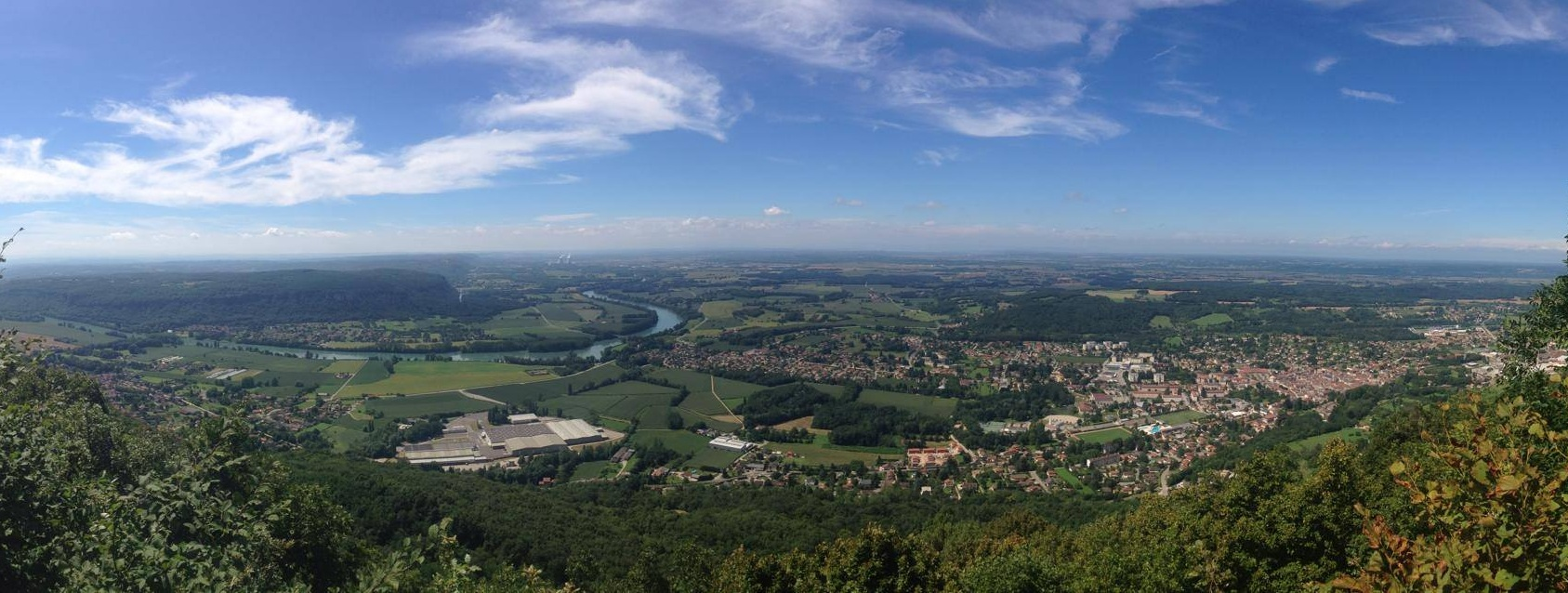 Photo de la plaine de l'Ain, vue de puis la croix de Bramafan (Lagnieu)